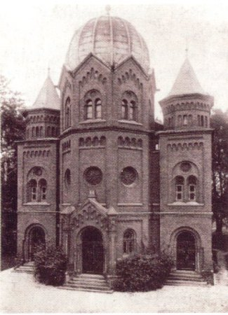 Synagoga w Kluczborku